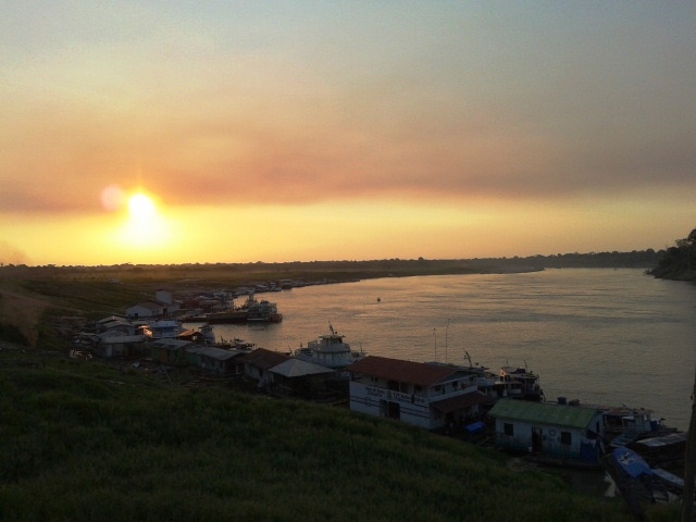 Por do Sol em Lábrea com vista do Rio Purus